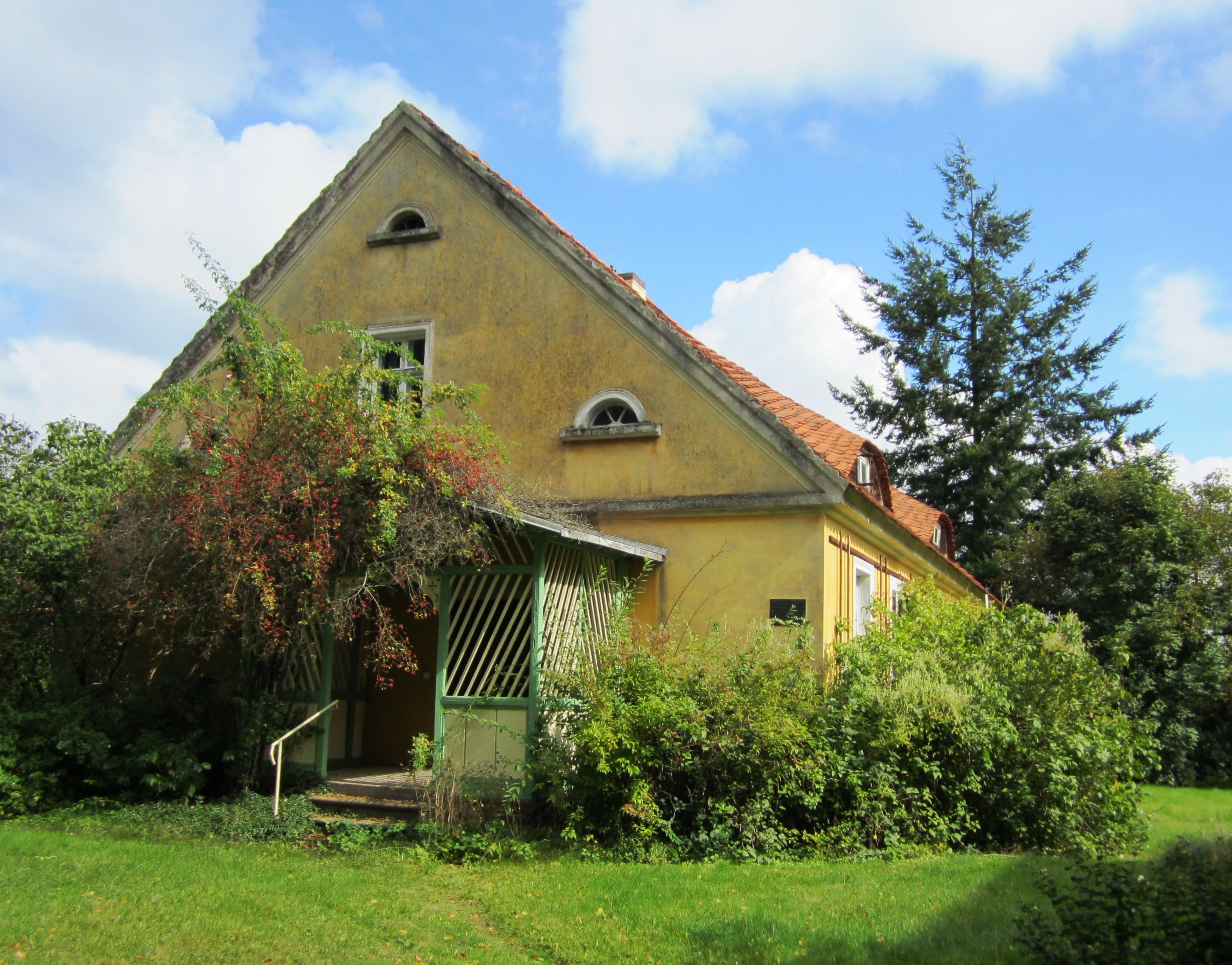 Pfarrhaus in Dorf Zechlin, Anger 9